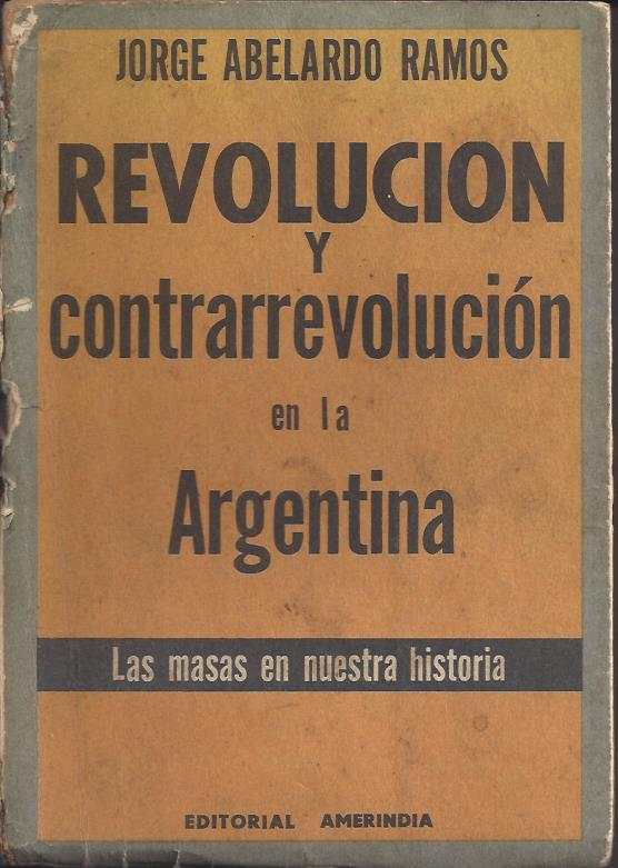 1° Edición 1957 Amerindia